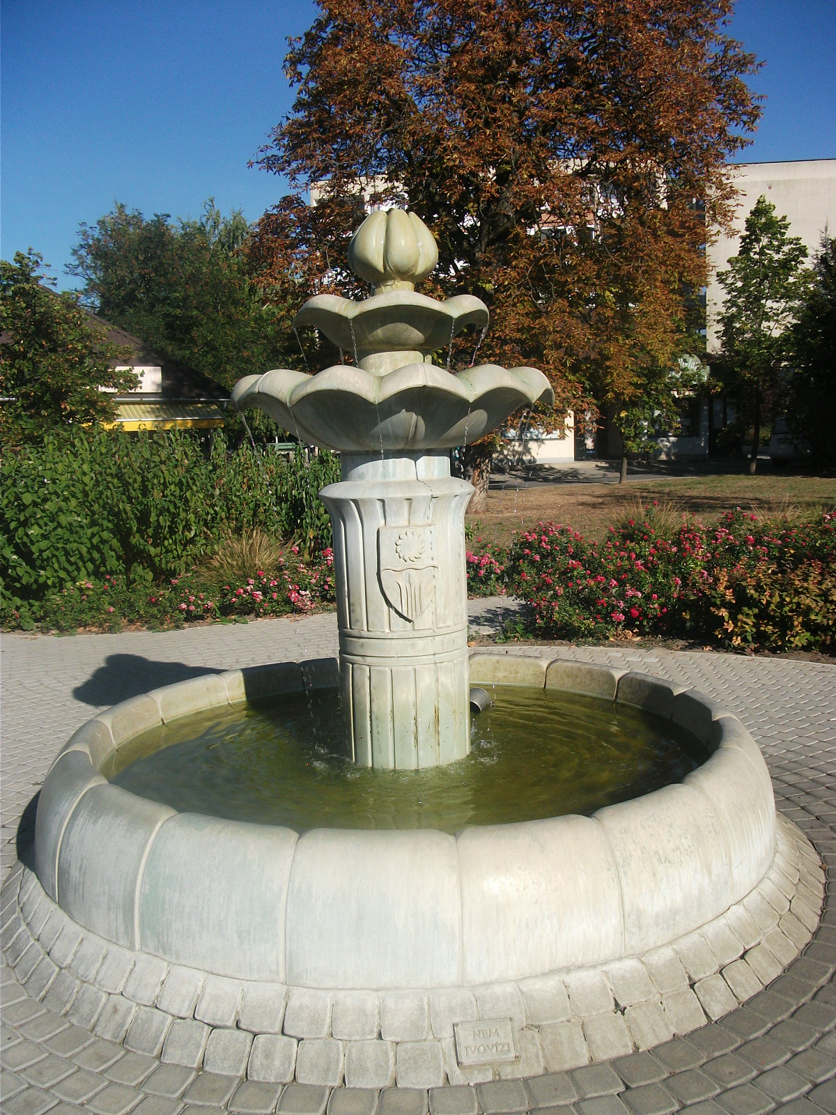 Szökőkút Gárdony címerével a gárdonyi Polgármesteri Hivatal előtt. Ambrus Éva (*1941) keramikusművész alkotása